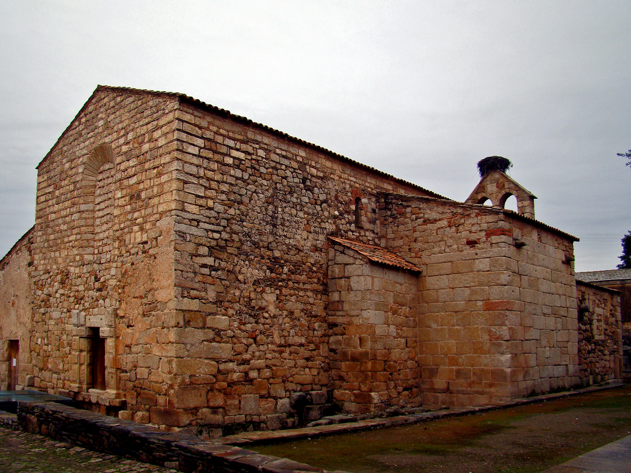 catedral idanha a velha This monument is classified as Monumento Nacional. This file was uploaded for Wiki Loves Monuments in Portugal with the unique identifier 70554.